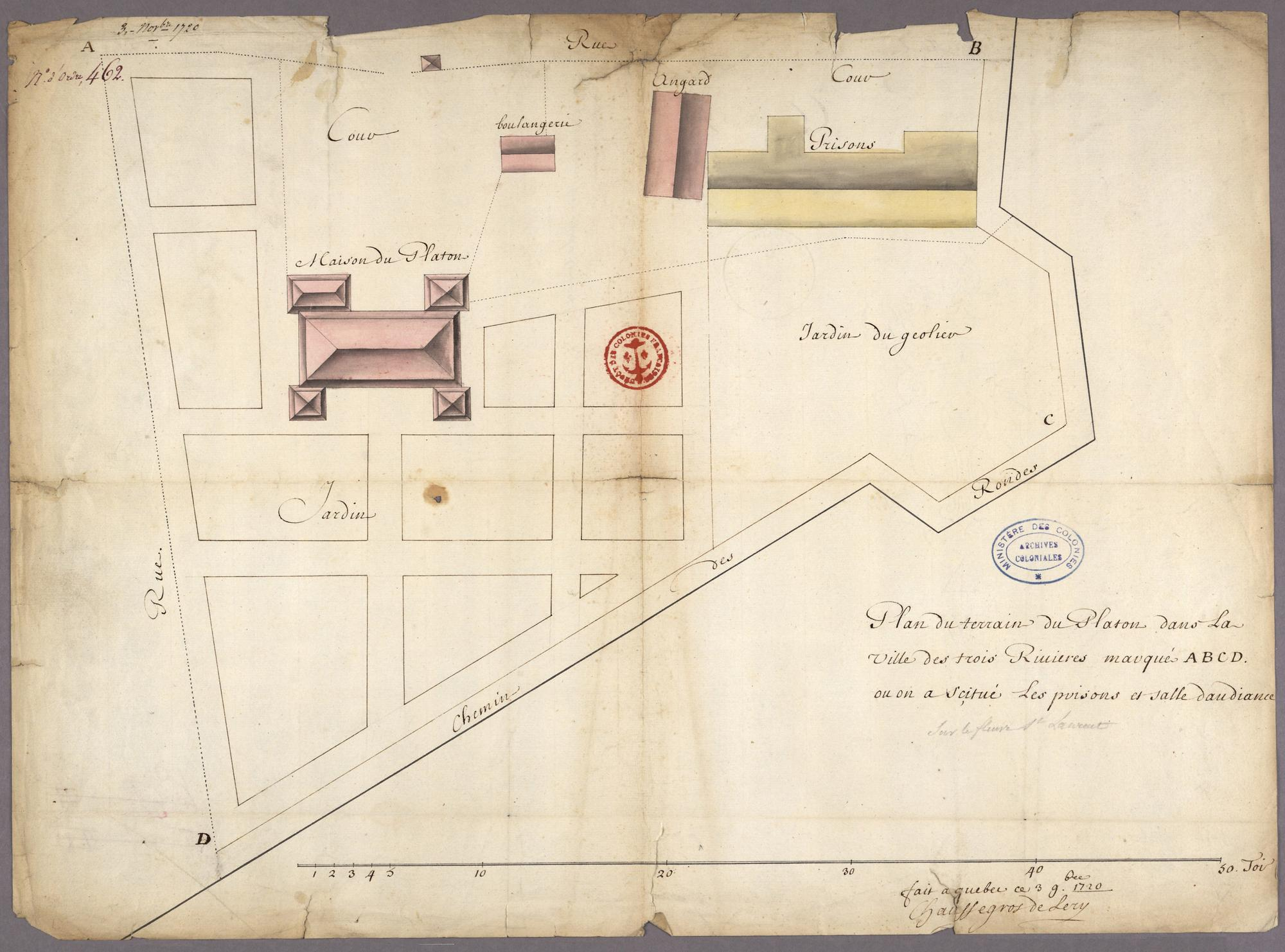 Plan du Platon, Trois-Rivières, le 3 novembre 1720. Bibliothèque et Archives Canada.